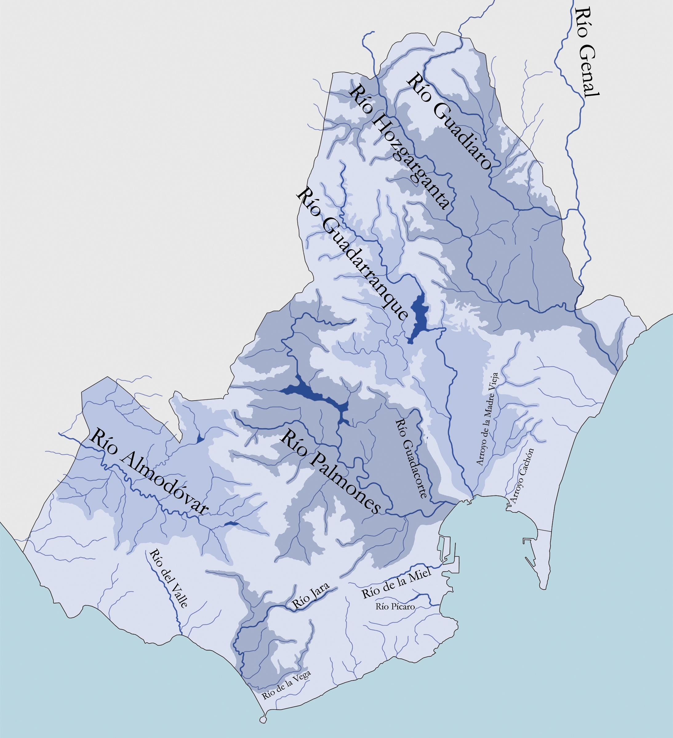 Mapa hidrológico del Campo de Gibraltar, Andalucía, España.